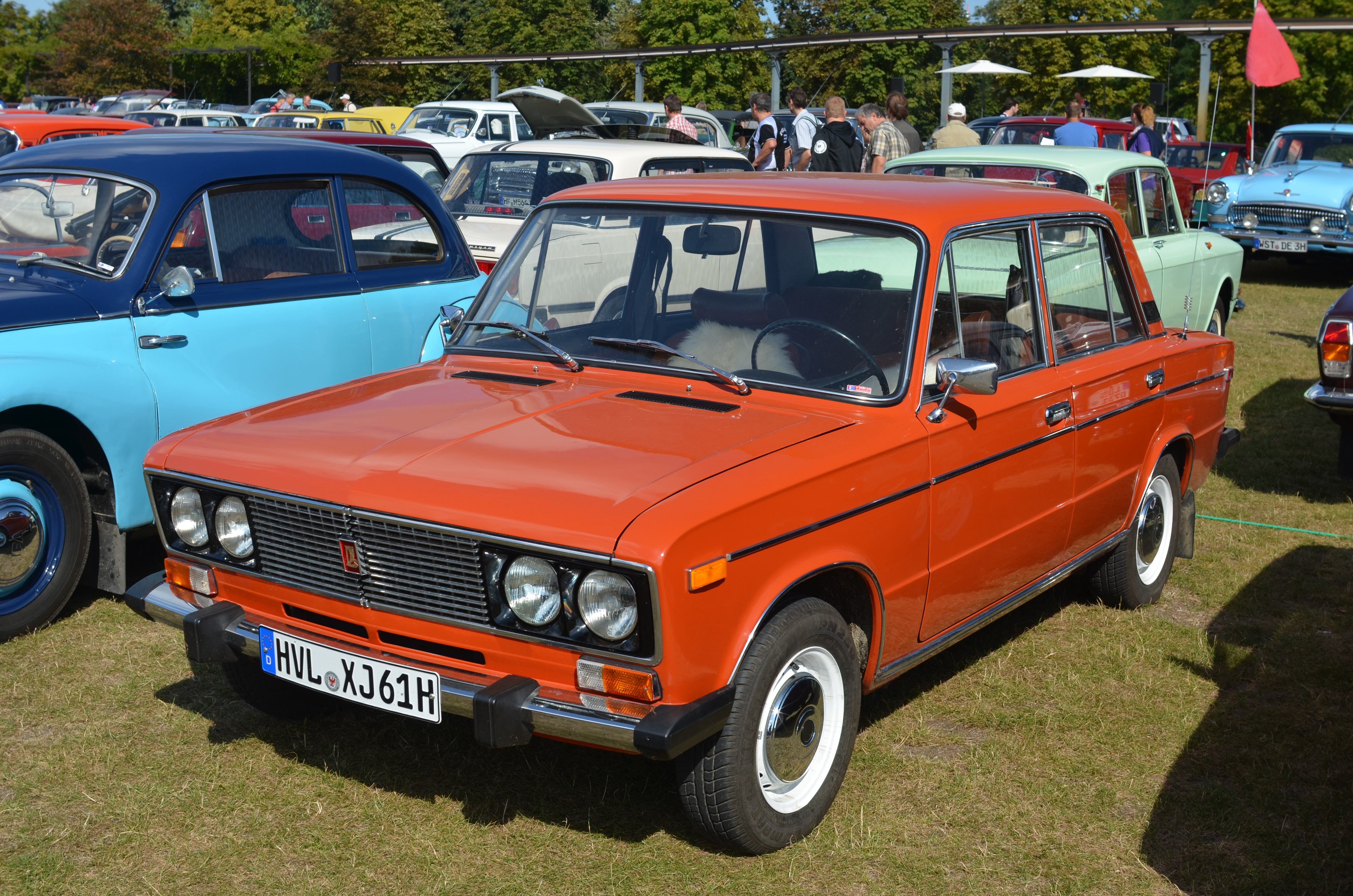 Lada